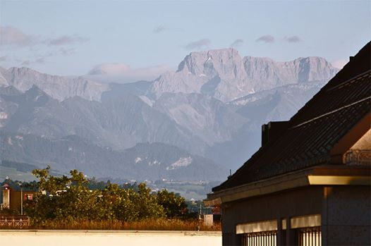 Der Bös Fulen in der Abendsonne, gesehen vom Kreis 4, Zürich